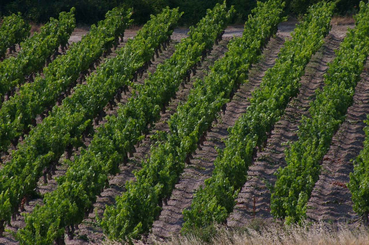 Vignoble d'Aragon dans l'Aude